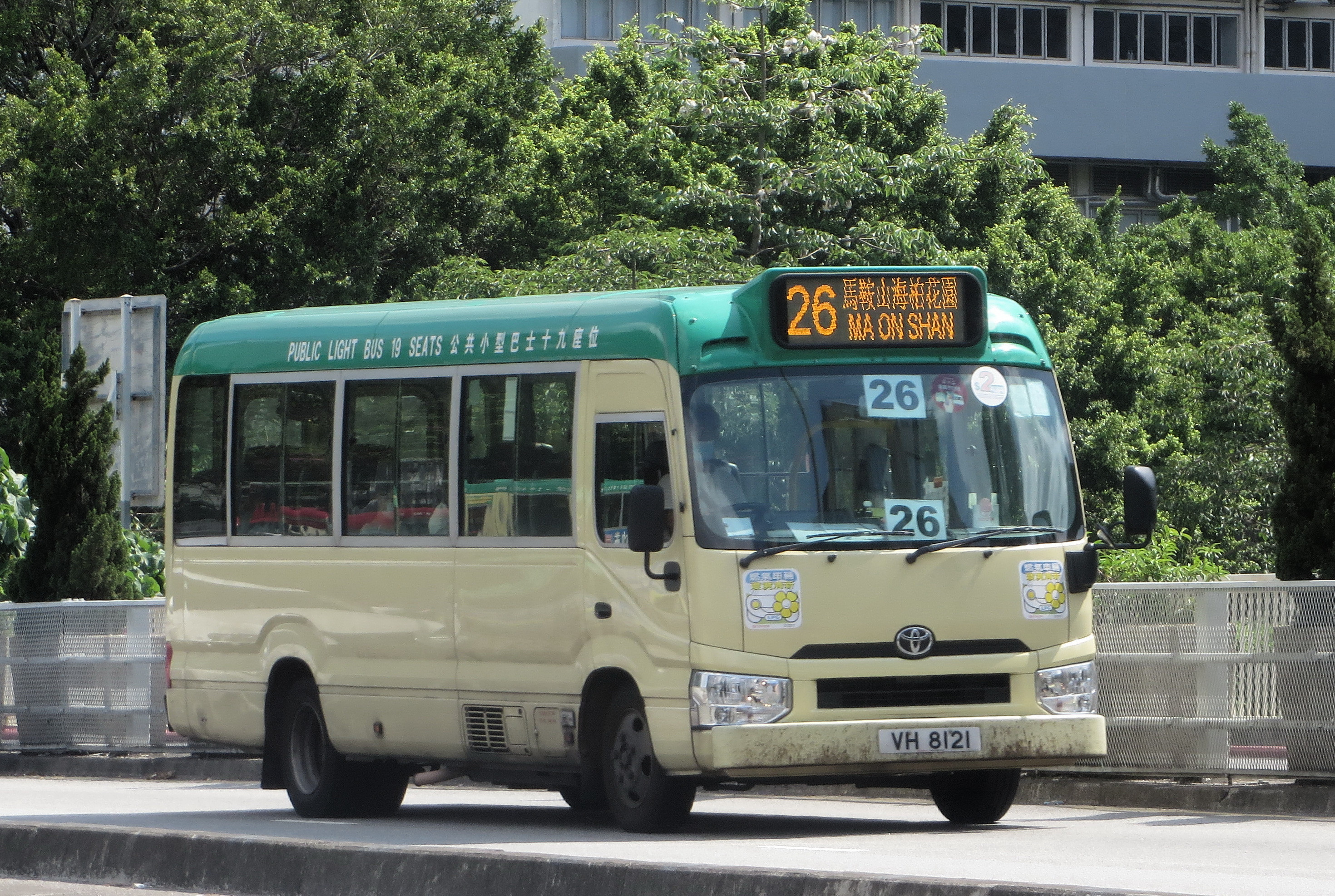 中文（中国大陆）: 小巴VH1821的照片